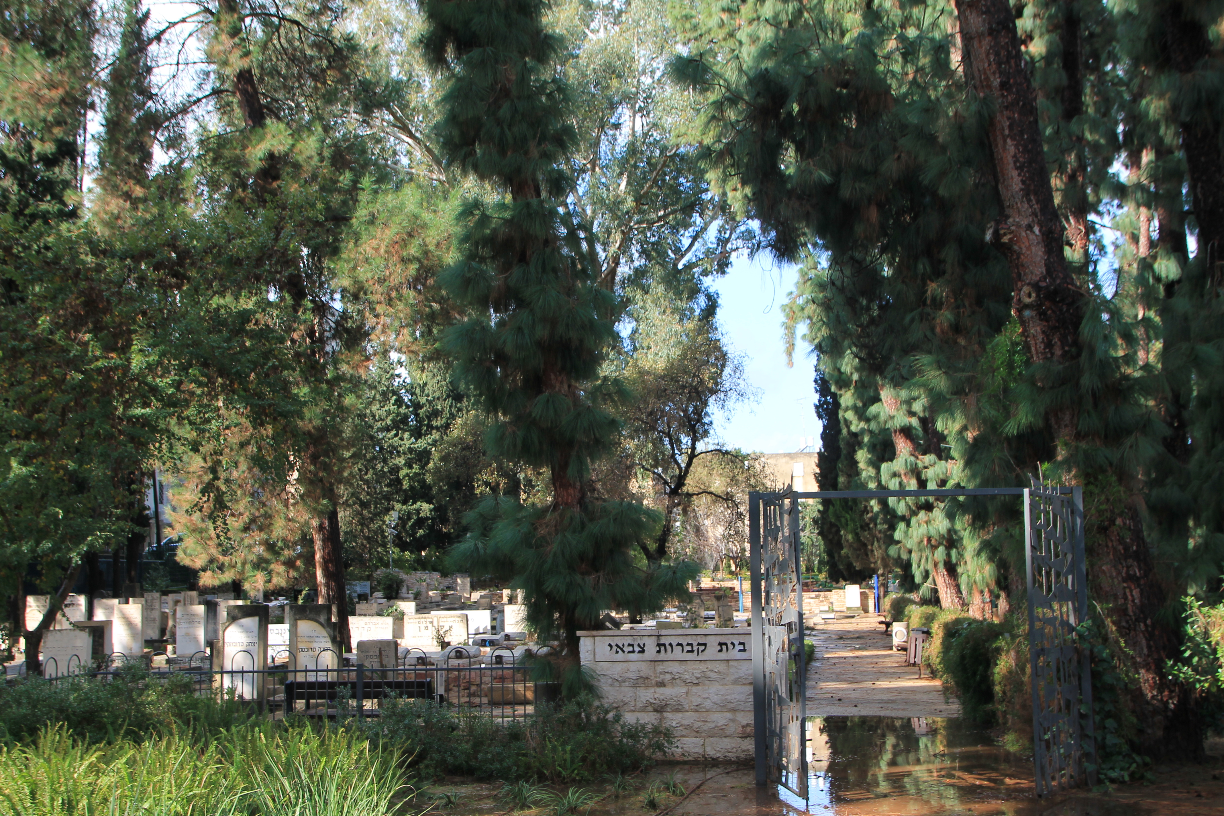 בית קברות הצבאי וחלקת מגורשי יפו בכפר סבא, כניסה אחורית